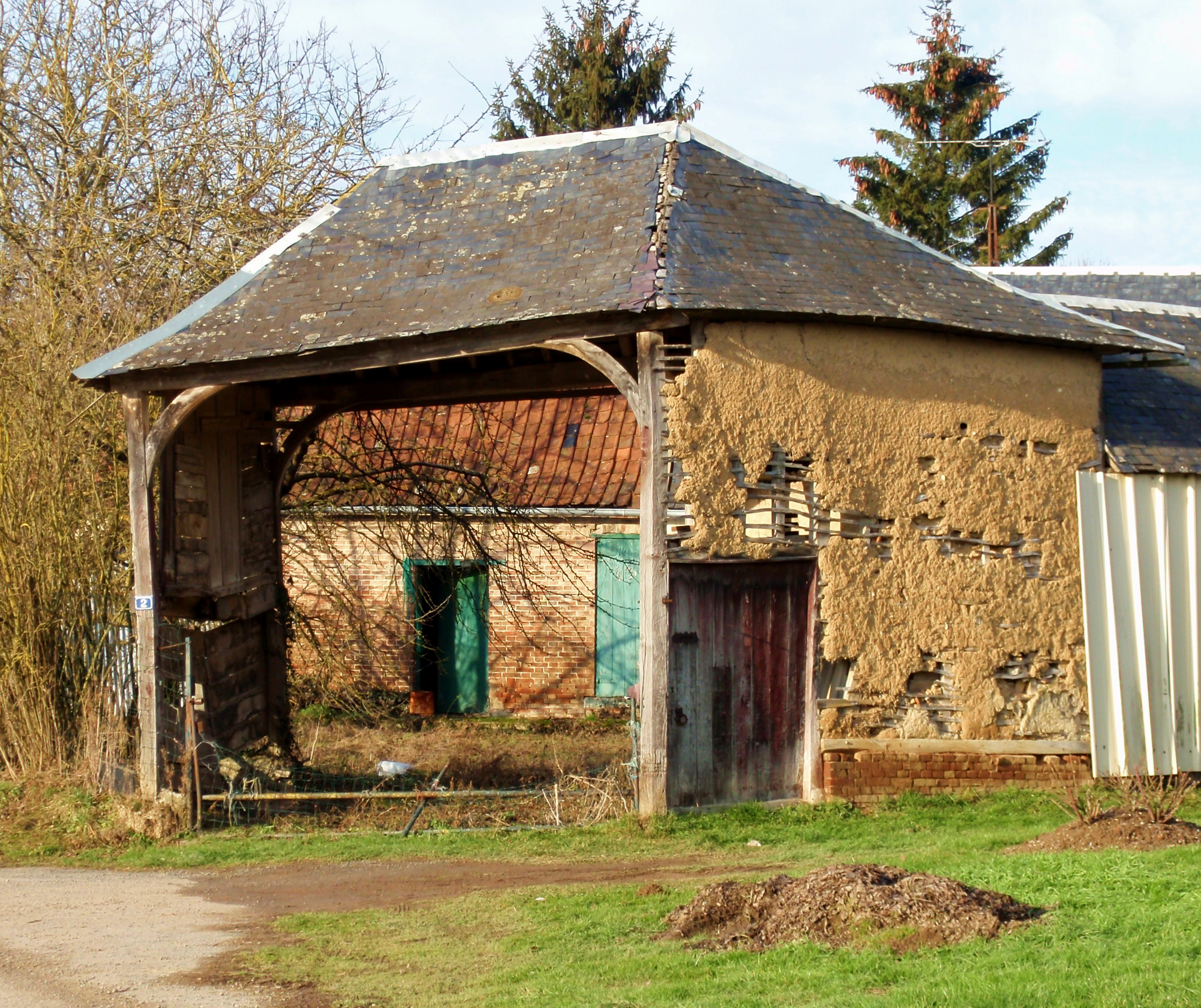 Brucamps (Somme, France). Porche d'une ancienne fermette, témoin fragile d'un mode de vie rural aujourd'hui disparu. A l'angle de la Grande Rue et de la Rue d'Ergnies.